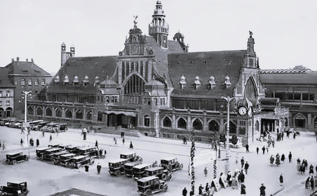 Essener Hauptbahnhof, wie er von 1902 bis zum Zweiten Weltkrieg war